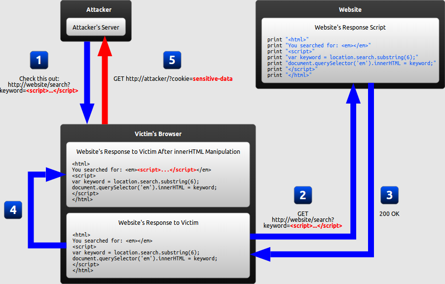 Монгол: DOM-based XSS